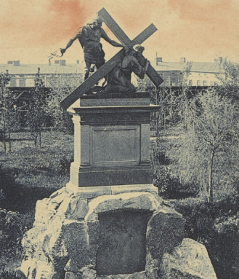 III stacja drogi krzyżowej wokół Jasnej Góry